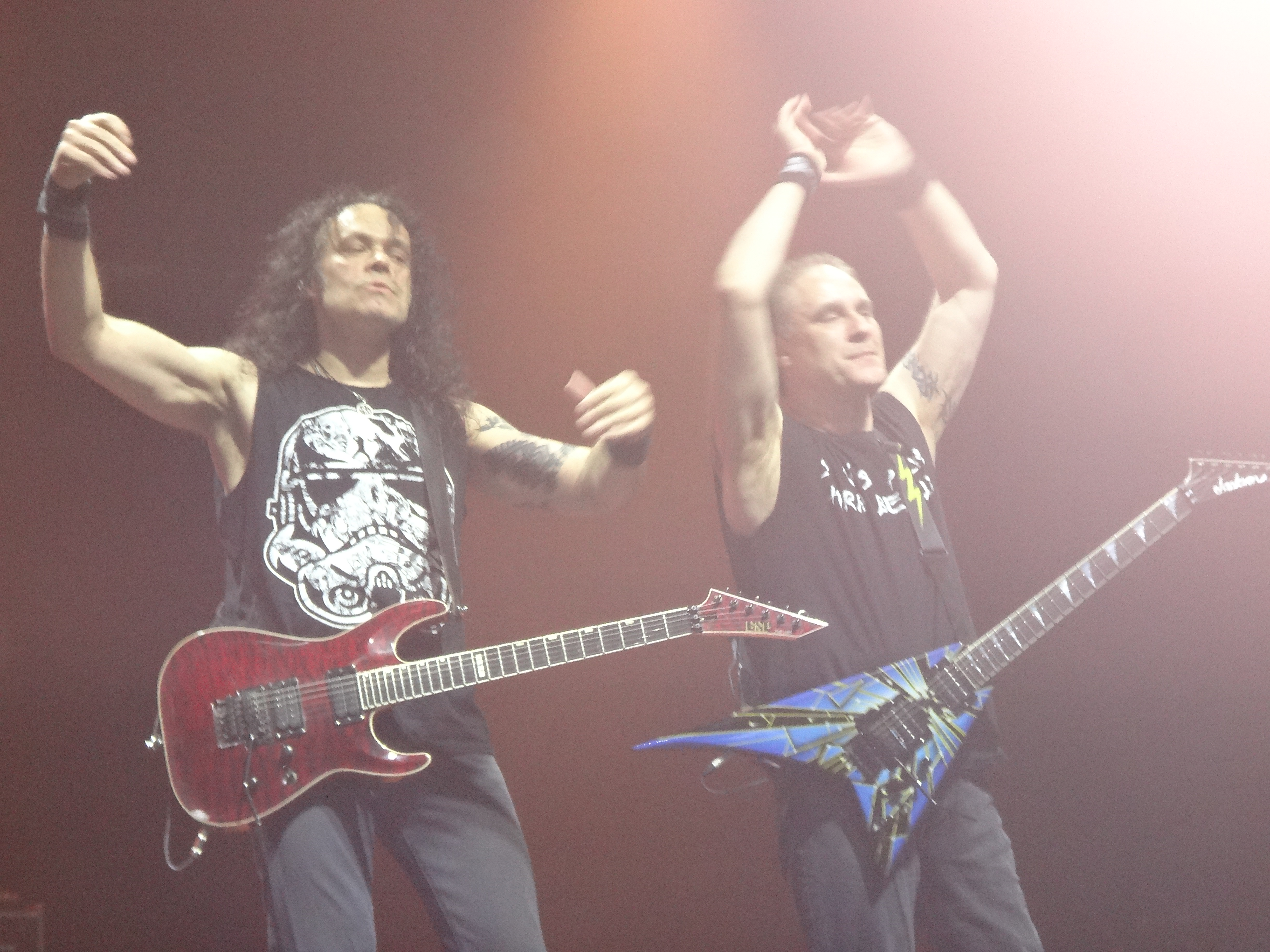 Попов и Холстинин во время презентации альбома «Через все времена»